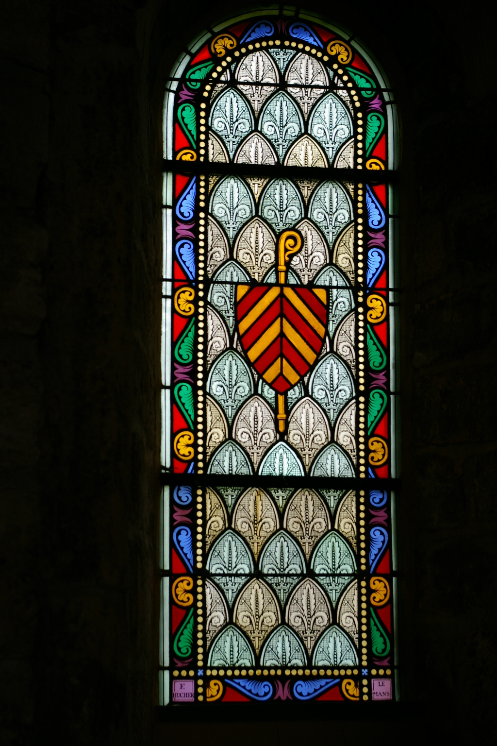 Vitrail de la chapelle de l'abbaye d'Etival-en-Charnie (Sarthe), aux armoiries de la famille de Beaumont : chevronné d'or et de gueules de 8 pièces.